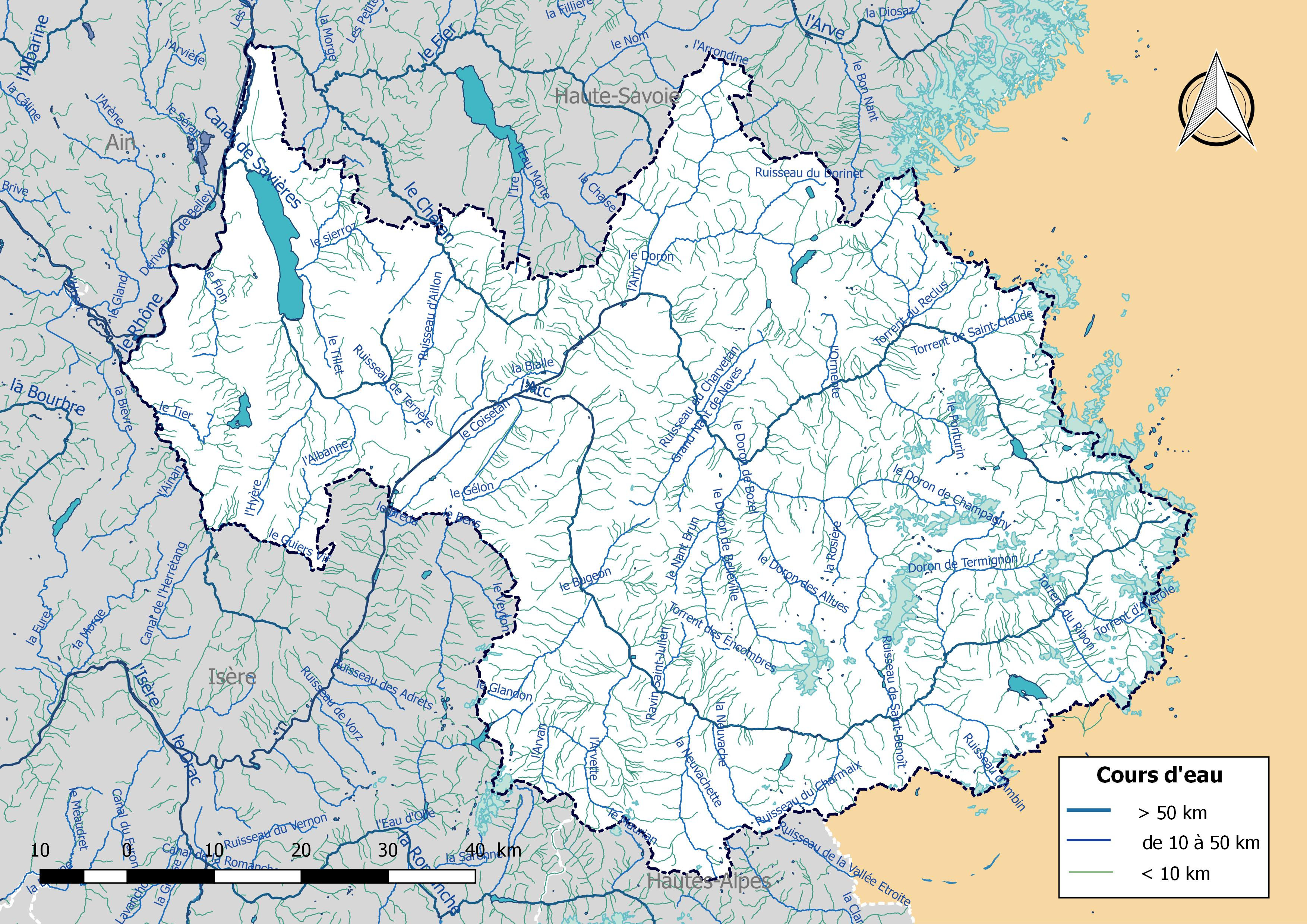 Réseau hydrographique du département de la Savoie (France).